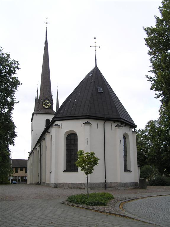 Arboga heliga trefaldighets kyrka